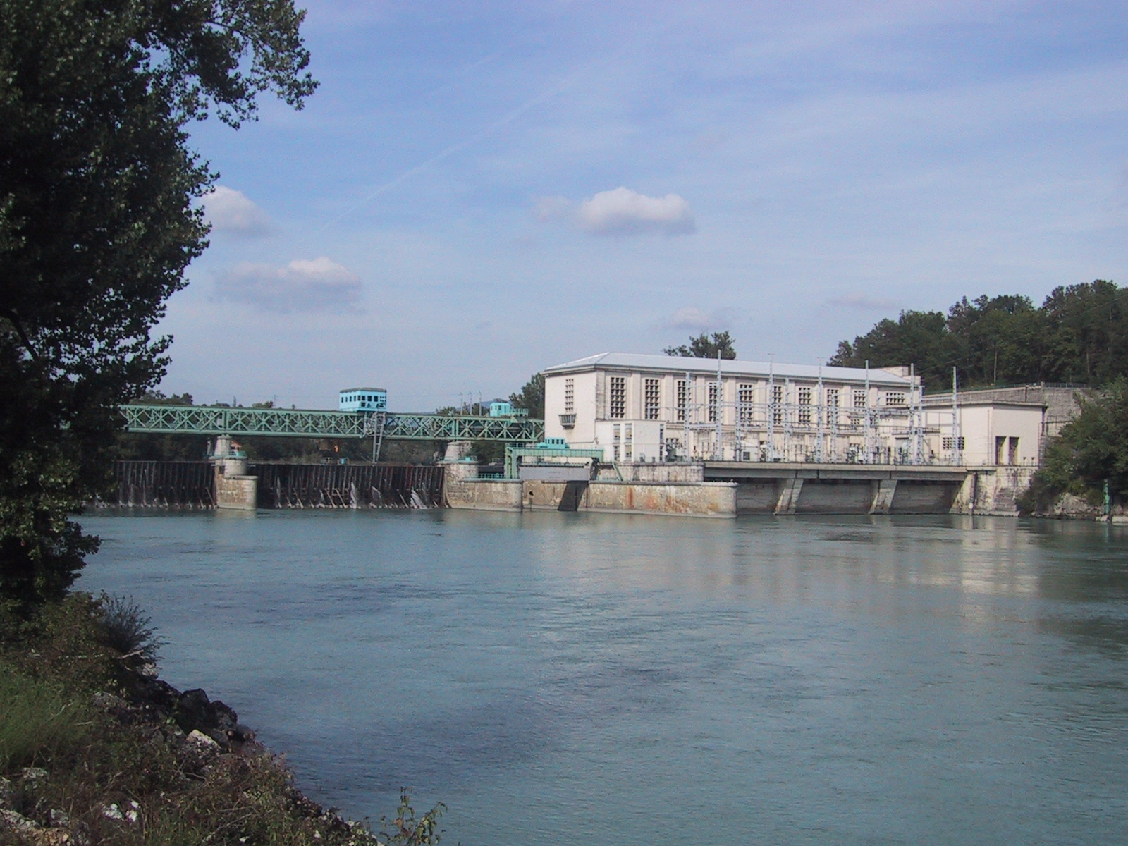 Le barrage de Seyssel (entre l'Ain et la Haute-Savoie). Auteur : Aurélien Campéas, septembre 2005.